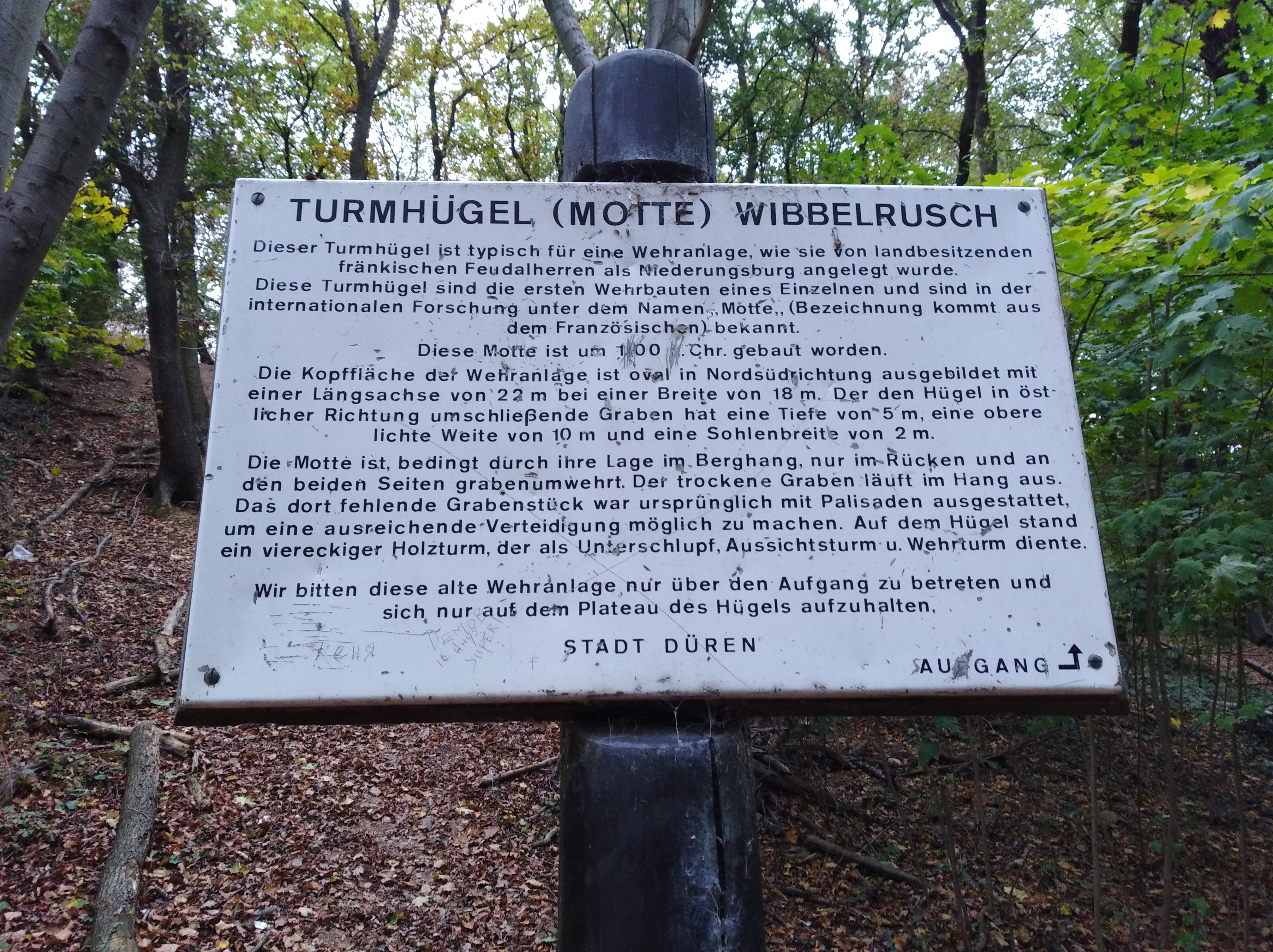 Schild an der Ostseite der Motte in Düren mit Erklärung